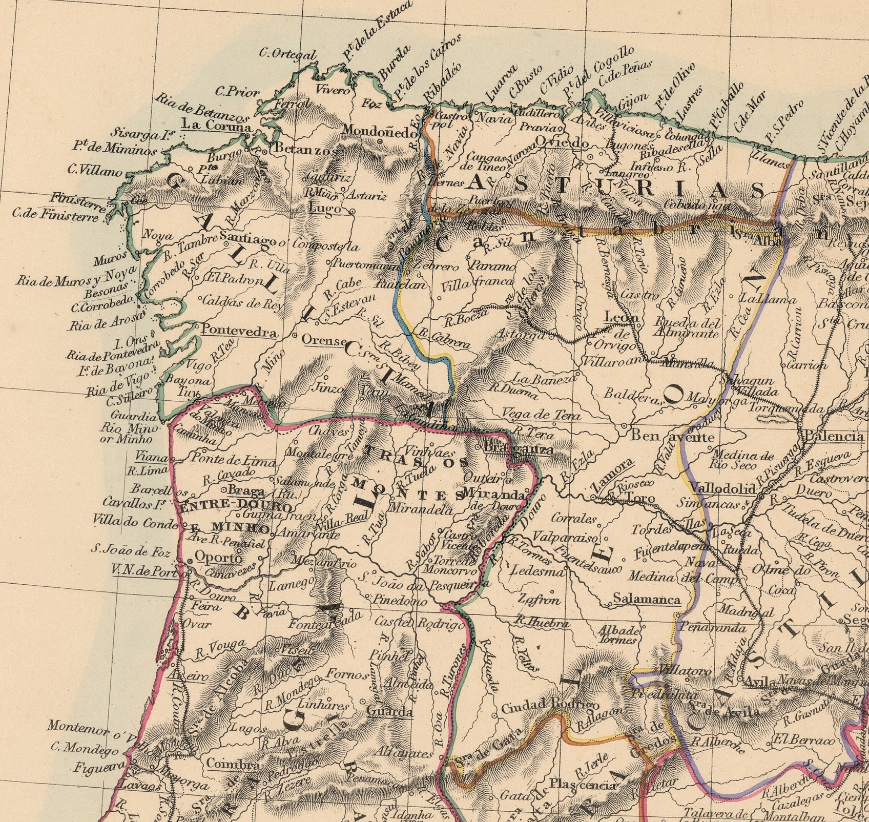 Detalle del noroeste ibérico en el mapa "Spain and Portugal in provinces" elaborado en 1838 por Philip Smith